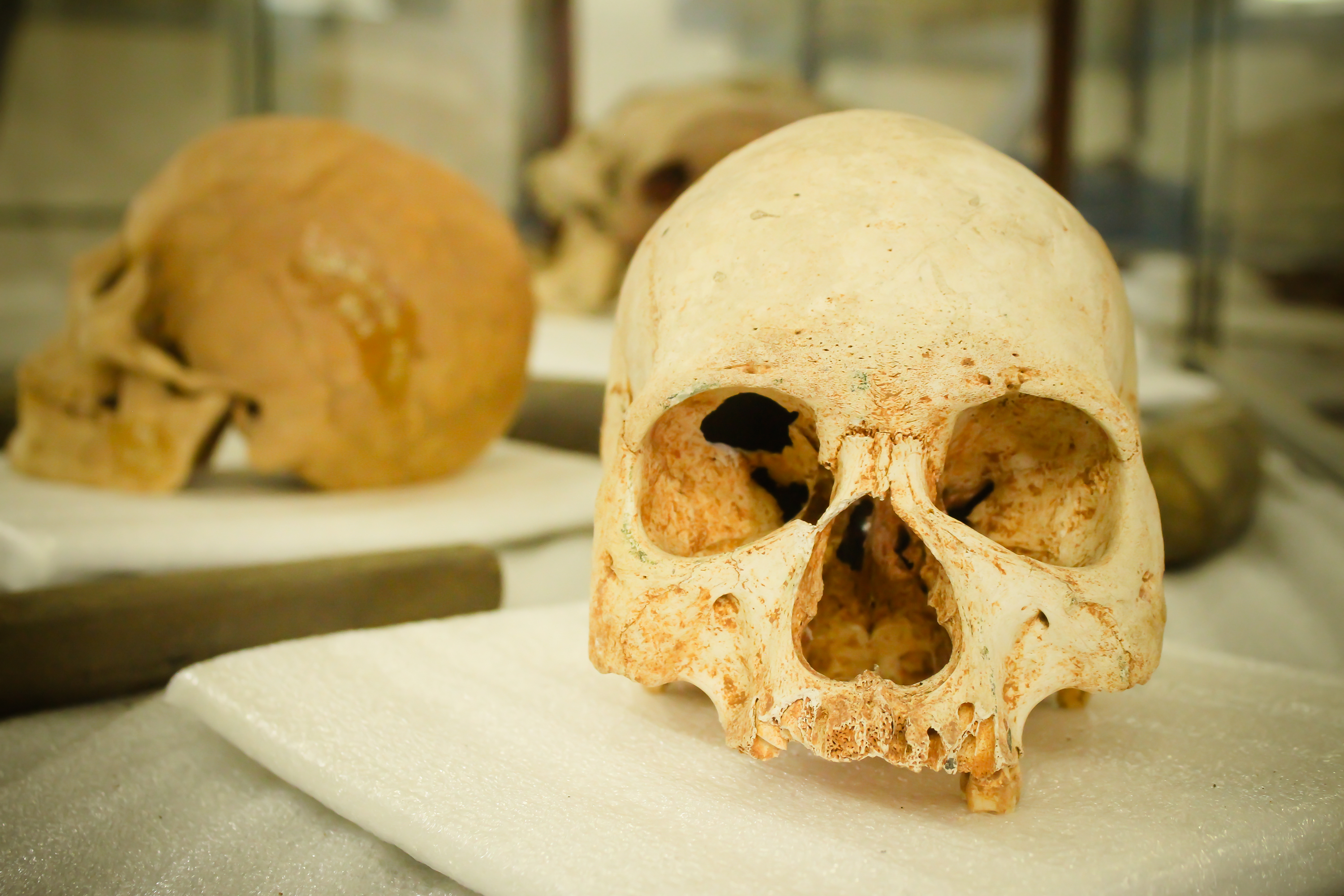 Coleção Arqueológica João Alfredo Rohr, assim distribuida: as peças depositadas nas dependências particulares do Colégio Catarinense; as peças em exposição no Museu Homem do Sambaqui